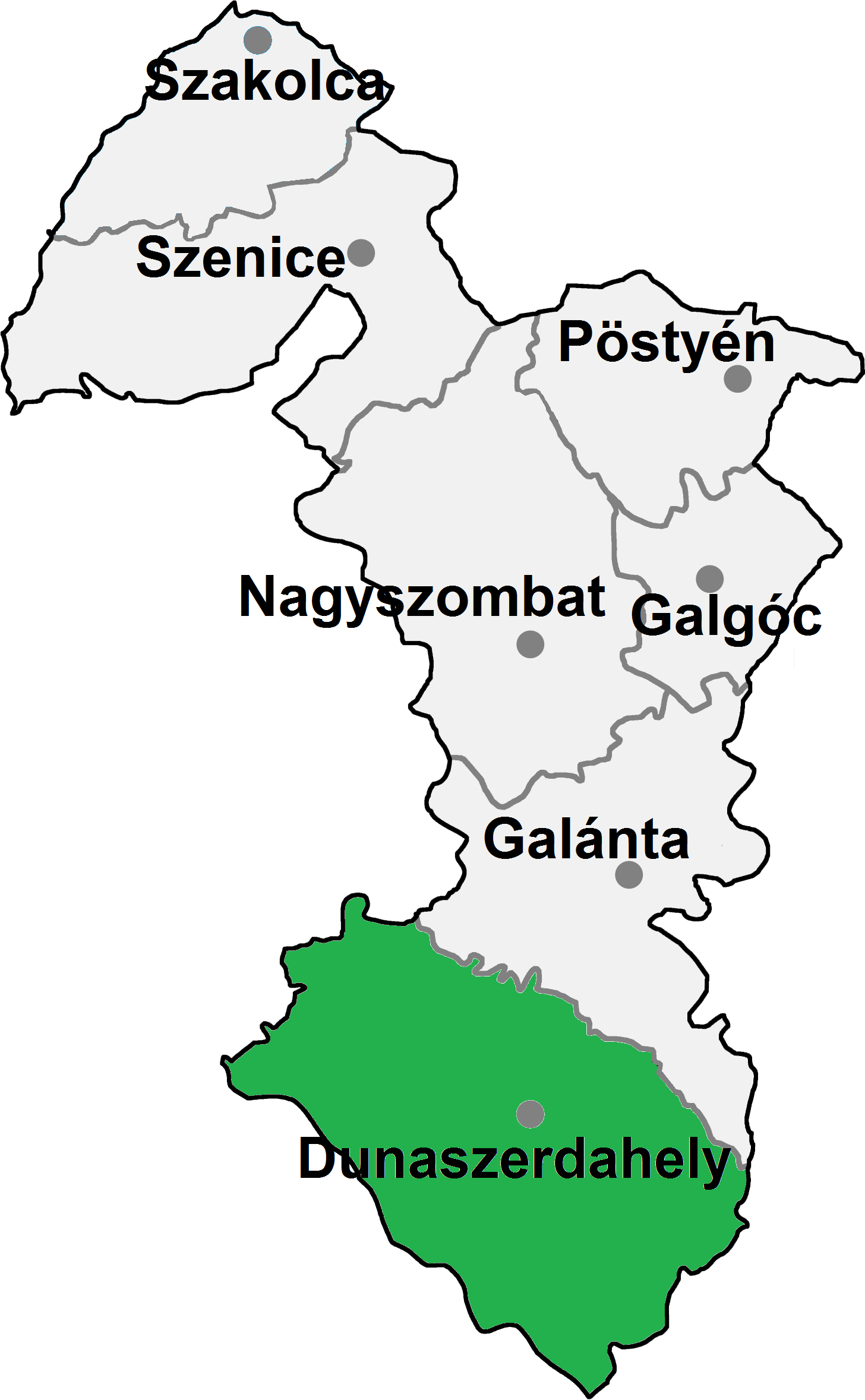 Dunaszerdahelyi járás